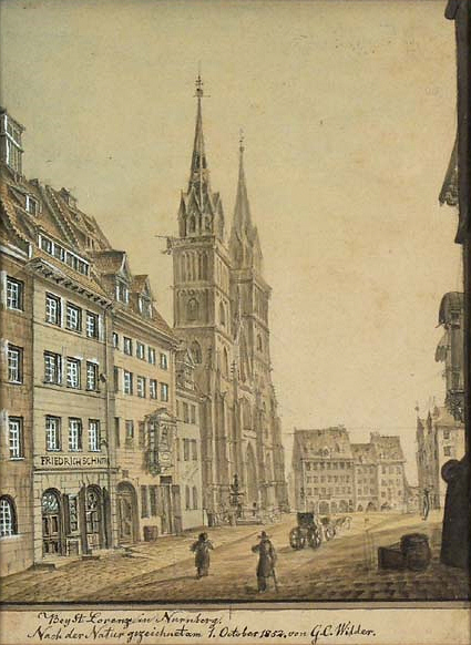 „Bey St.Lorenz in Nürnberg“, Sepia, 22 x 18 cm